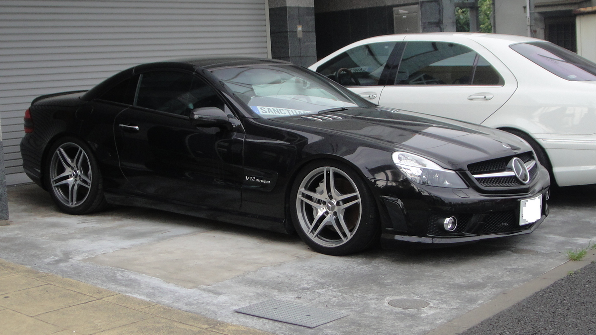 メルセデス・ベンツ SL65 AMG